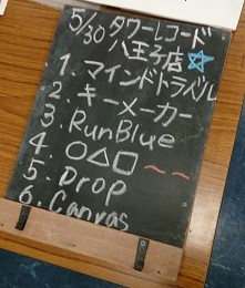 amiinaセトリボード(20150530(1))